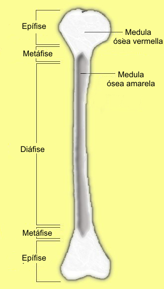 Partes de un hueso largo con rótulos en español.